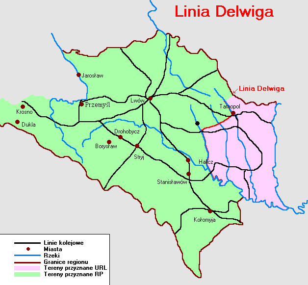 Linia Delwiga rozgraniczająca wojska polskie i ukraińskie